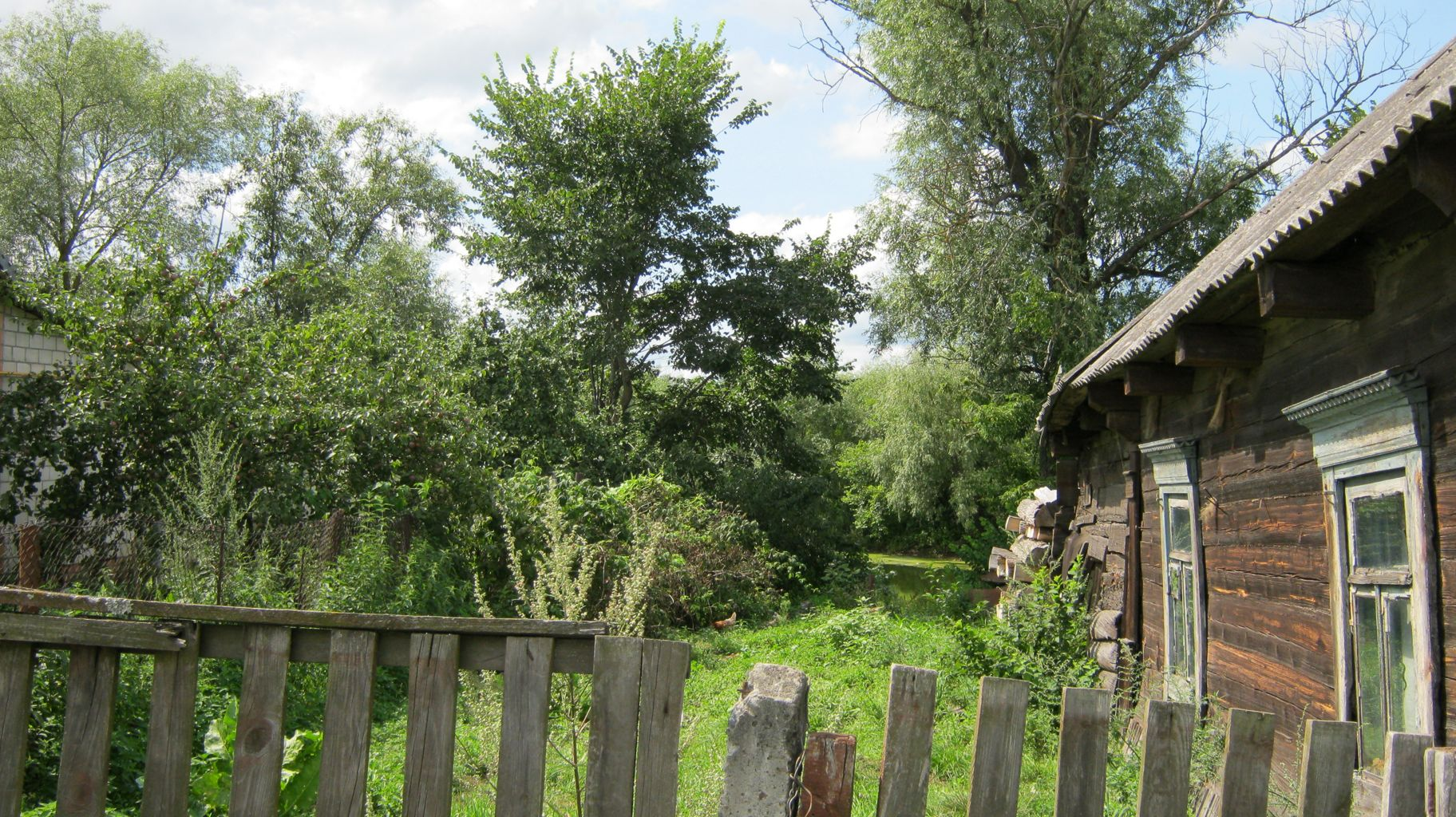 צילמתי את התמונה בטיול שורשים בבלארוס מתוך הזדהות עם הסיפור "מאחורי הגדר" של ביאליק